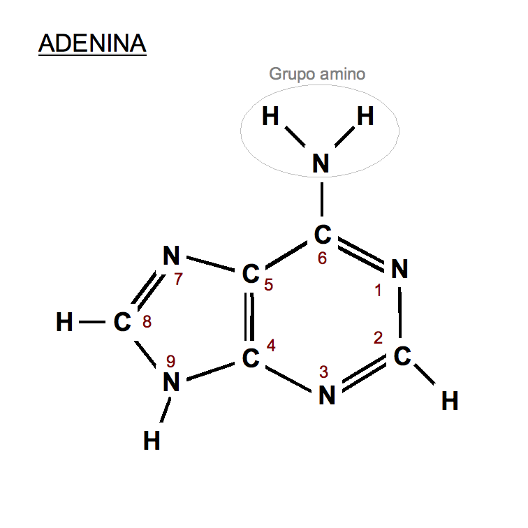 estructura química de la adenina